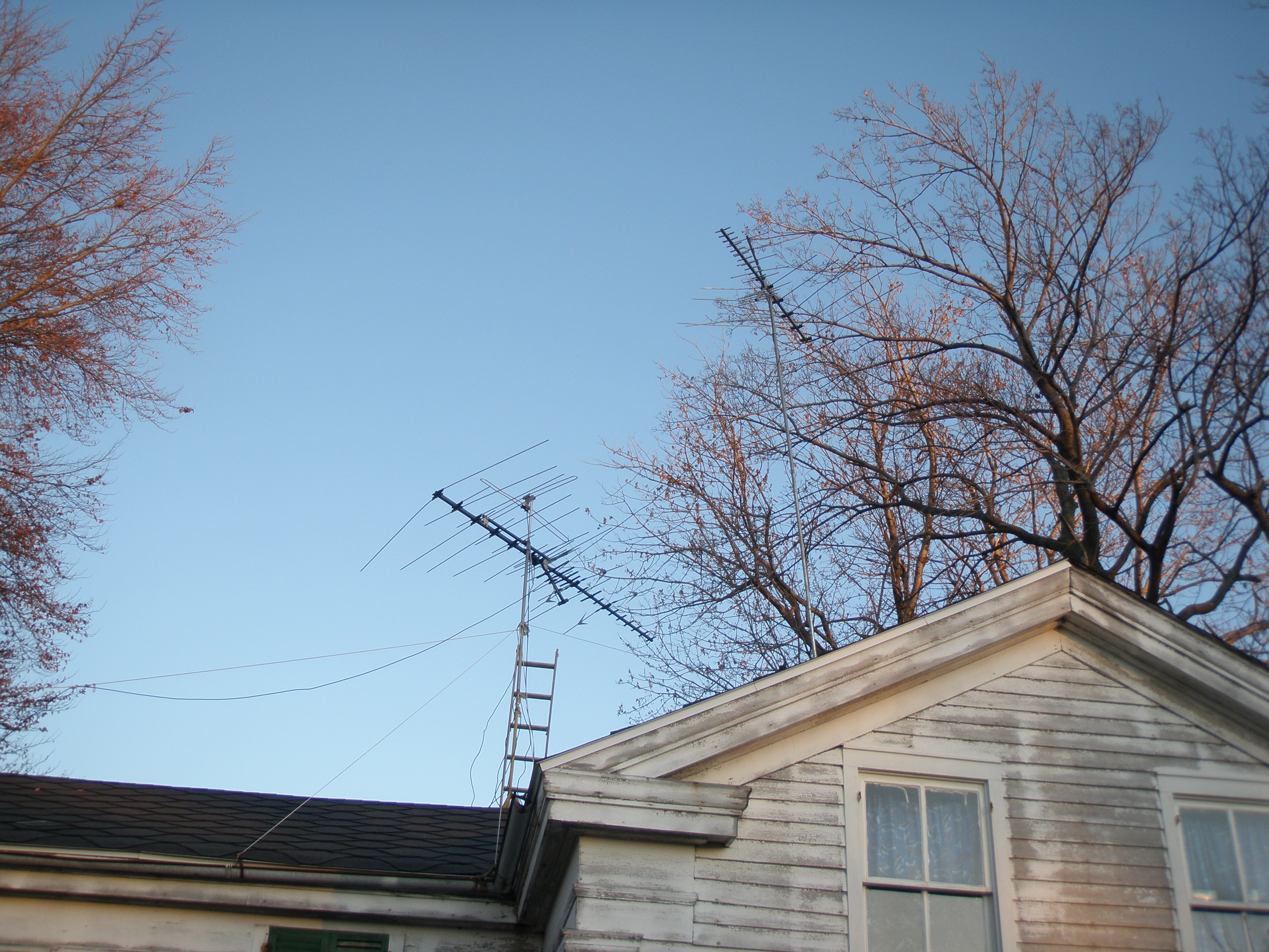 Multiple TV antenna setup